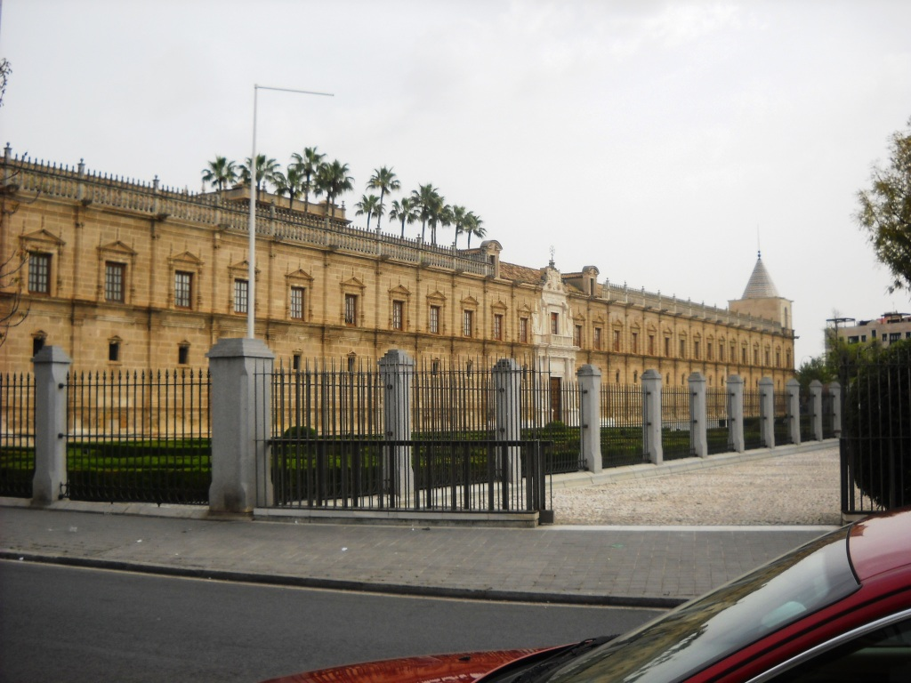 El antiguo Hospital de las Cinco Llagas o de la Sangre fue construido por deseo de Catalina de Rivera en el año 1500. Actualmente es el Parlamento Andaluz